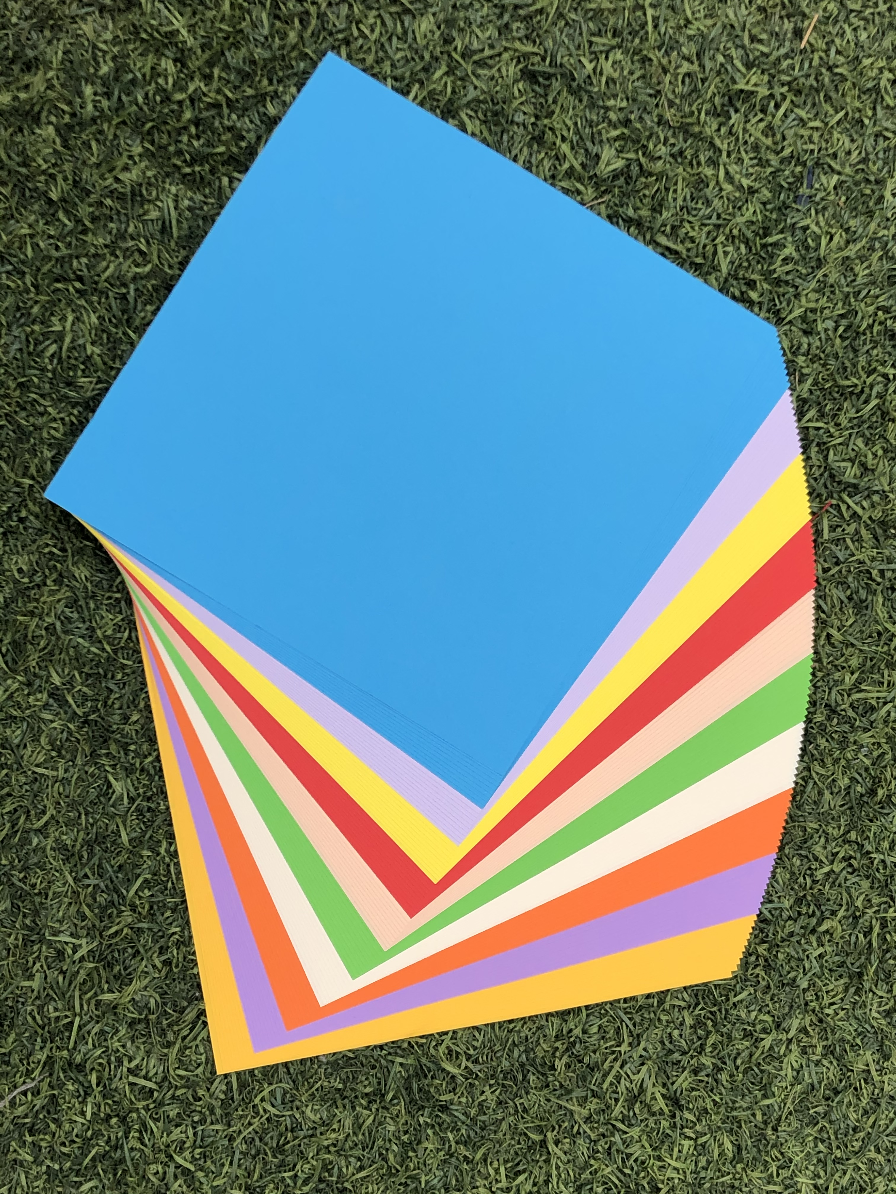 Giấy màu hình vuông